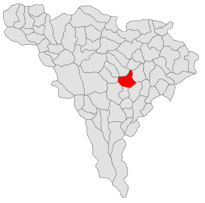 Categorie:Hărţi ale judeţului Alba